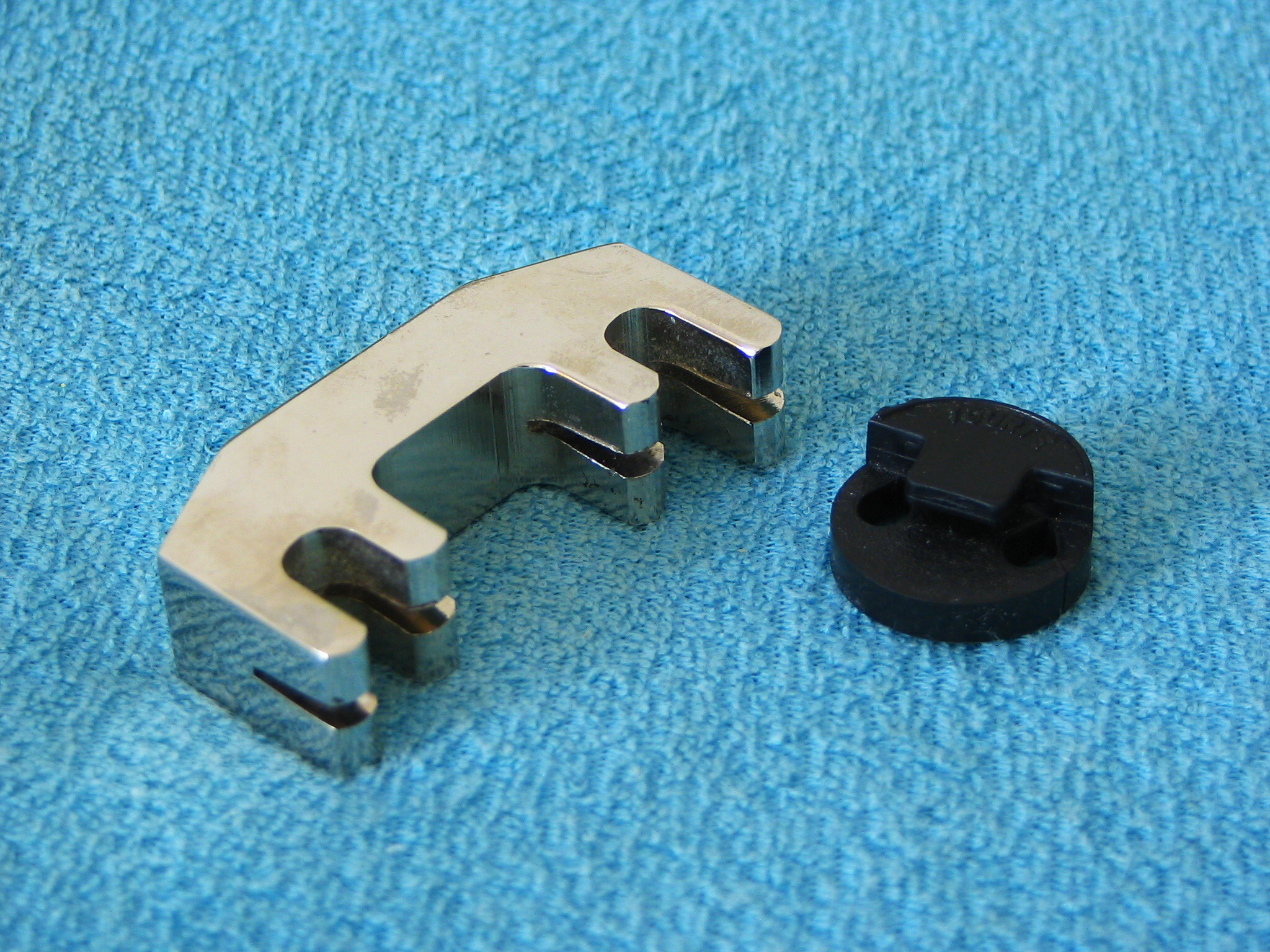 Violin mutes